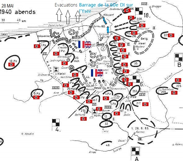 28 Mai - LA 60e Division d'infanterie fait barrage de Nieuport à Dixmute inclus dans l'opération Dynamo.